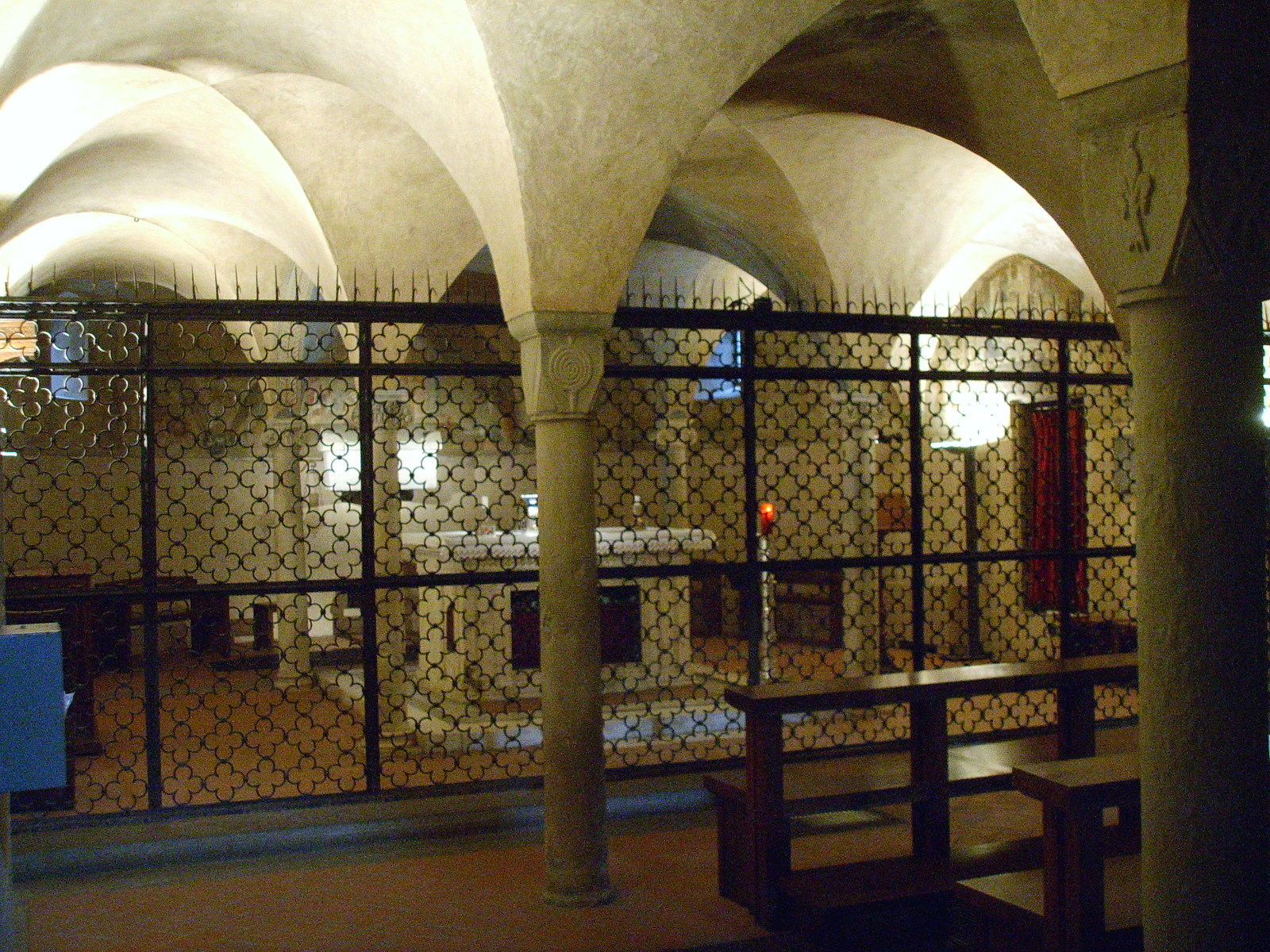 Duomo di fiesole, cripta con capitelli XI secolo